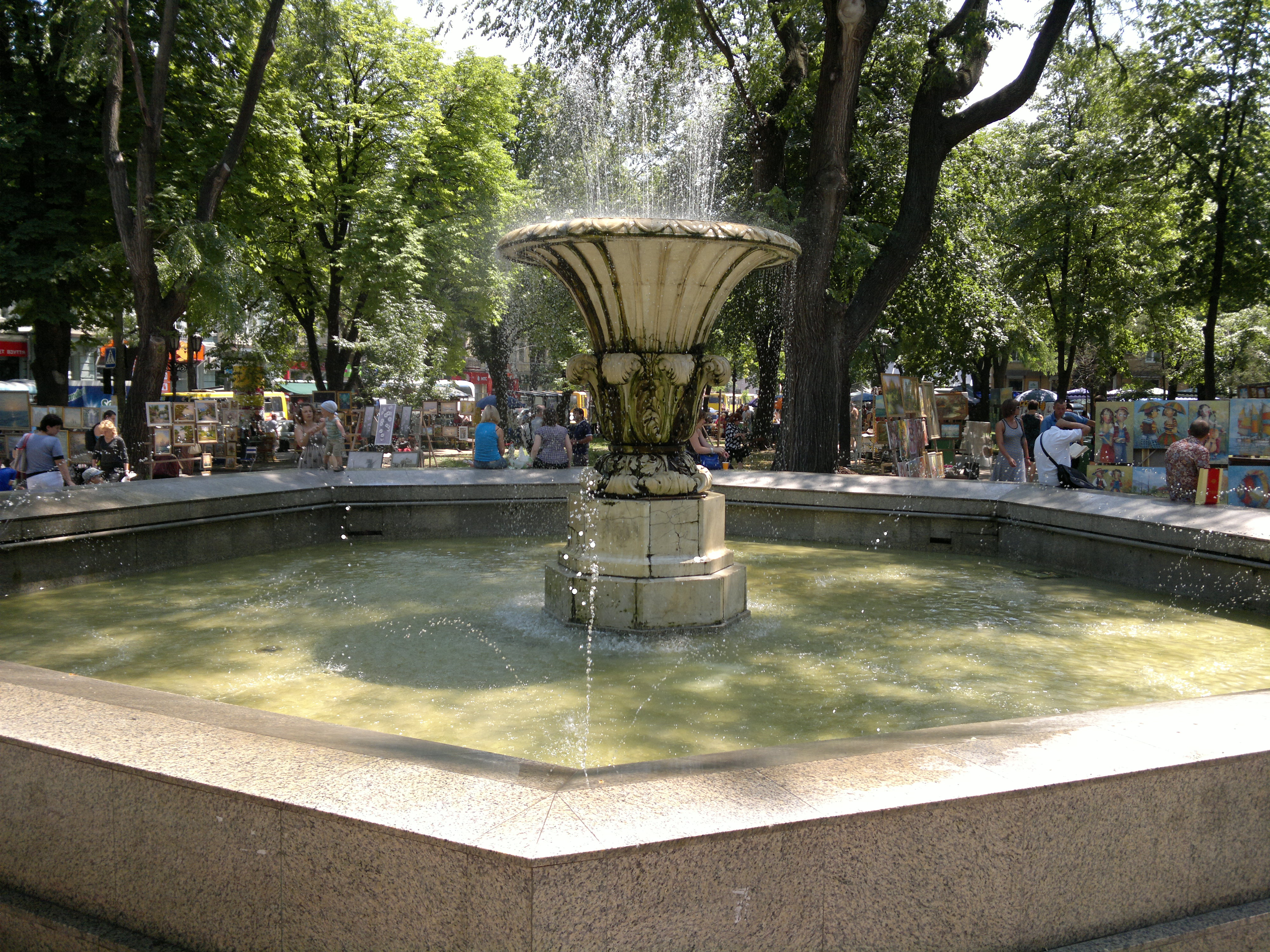 ФОНТАН НА СОБОРКЕ